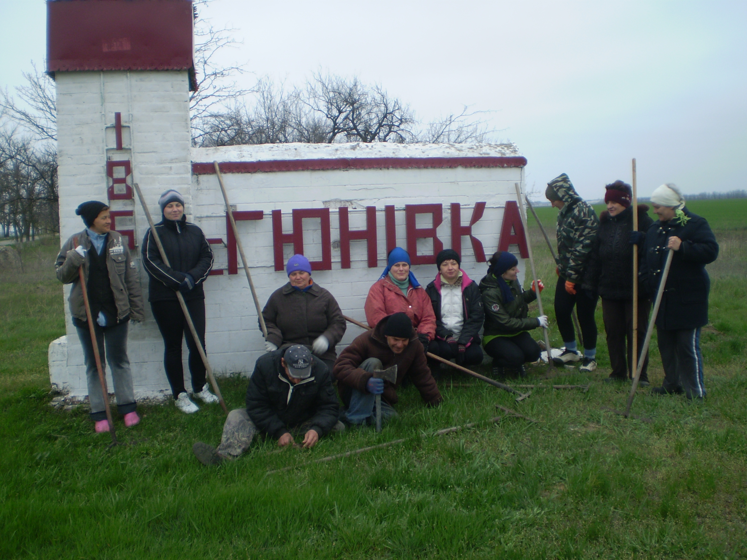 Суботник, 2014 рік